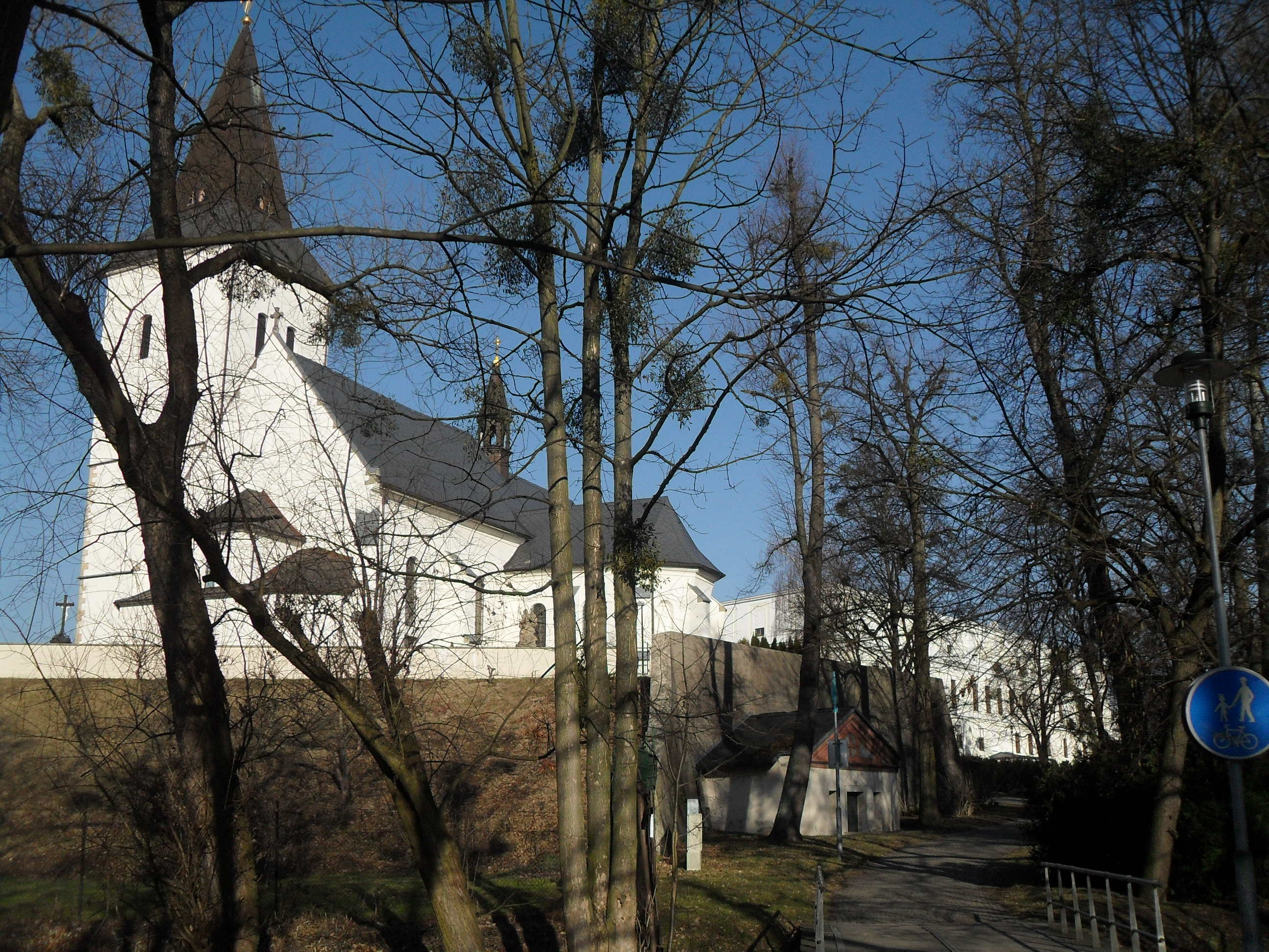 Goticko - renesanční Piastovský hrad Fryštát